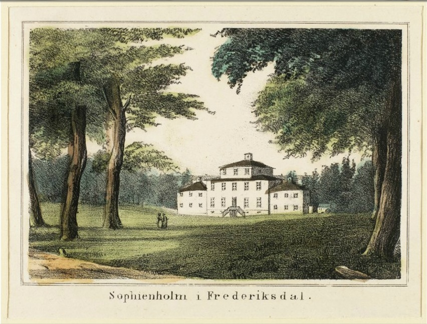 Sophienholm